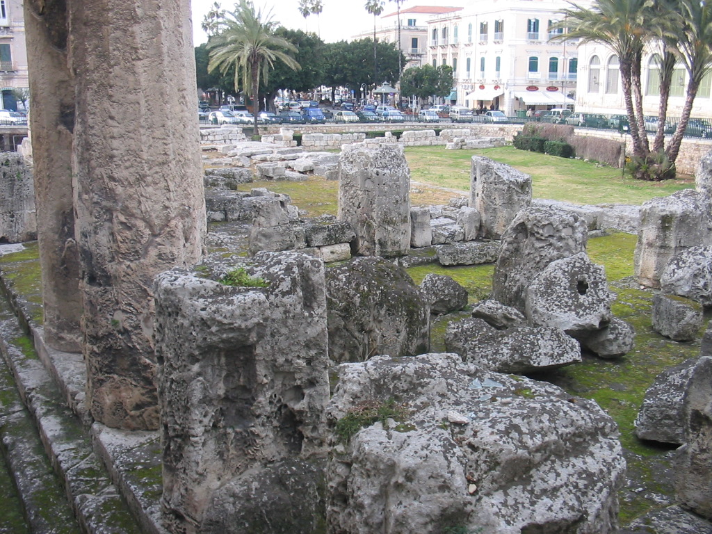 Tempio di Apollo a Siracusa, Italy